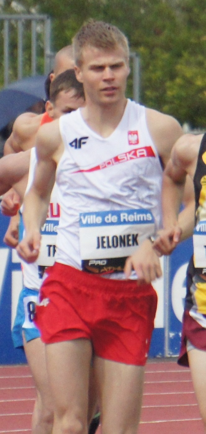 5 000 mètres marche lors des Rencontres d'athlétisme de Reims 2013: Jakub Jelonek.